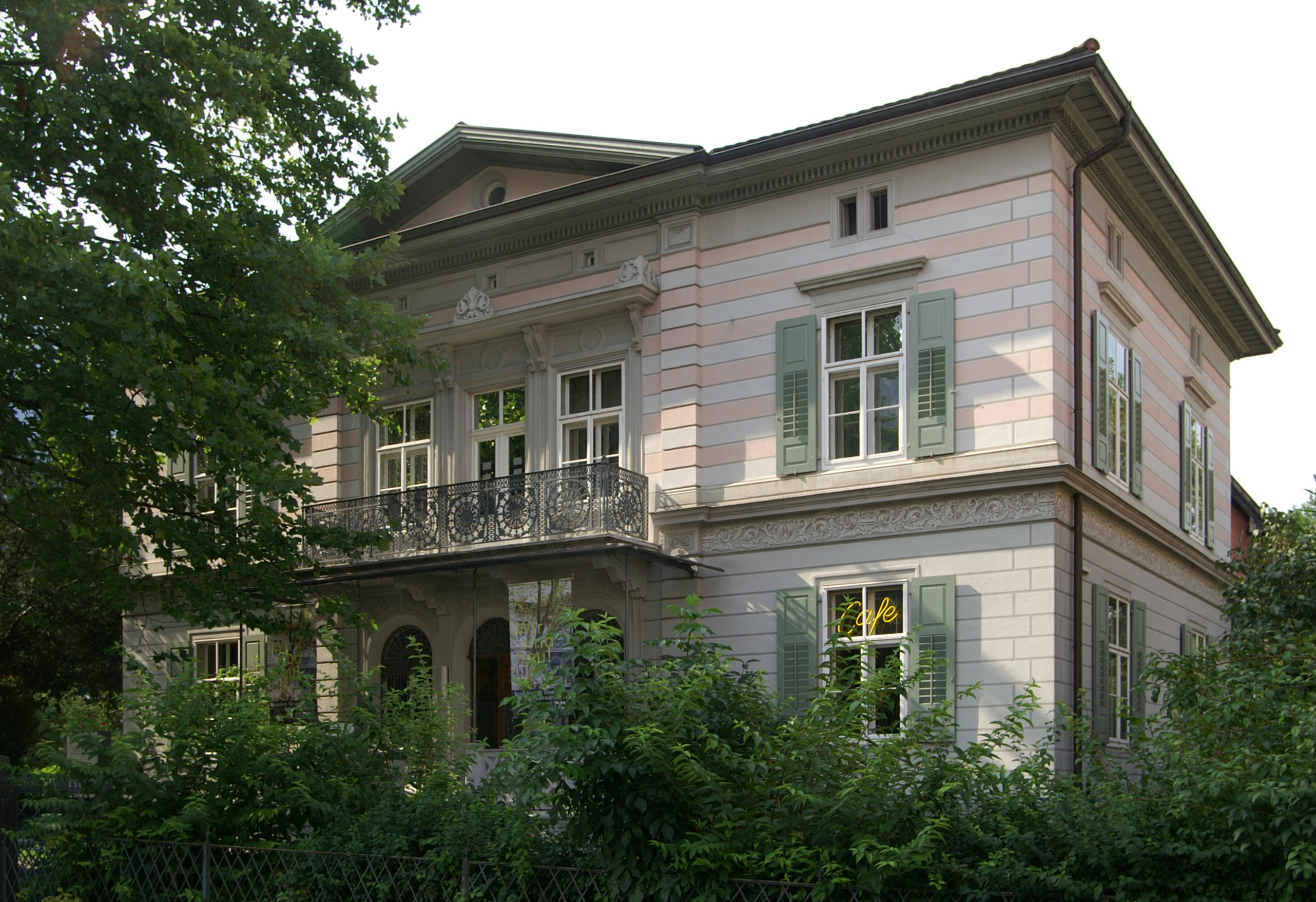 Jüdisches Museum Hohenems aus dem DEHIO Vorarlberg 1983: Schweizer-Straße Nr.5 in Hohenems; ("Burtschervilla"): Bemerkenswerte strenghistoristische Villa, erbaut um 1860-1870, kubischer Baukörper mit durch Dreieckgiebel bekröntem Mittelrisalit, stark akzentuierte Eingangspartie, originale Fassadenmalerei mit aufgemalter Nutung und Ornamentik.